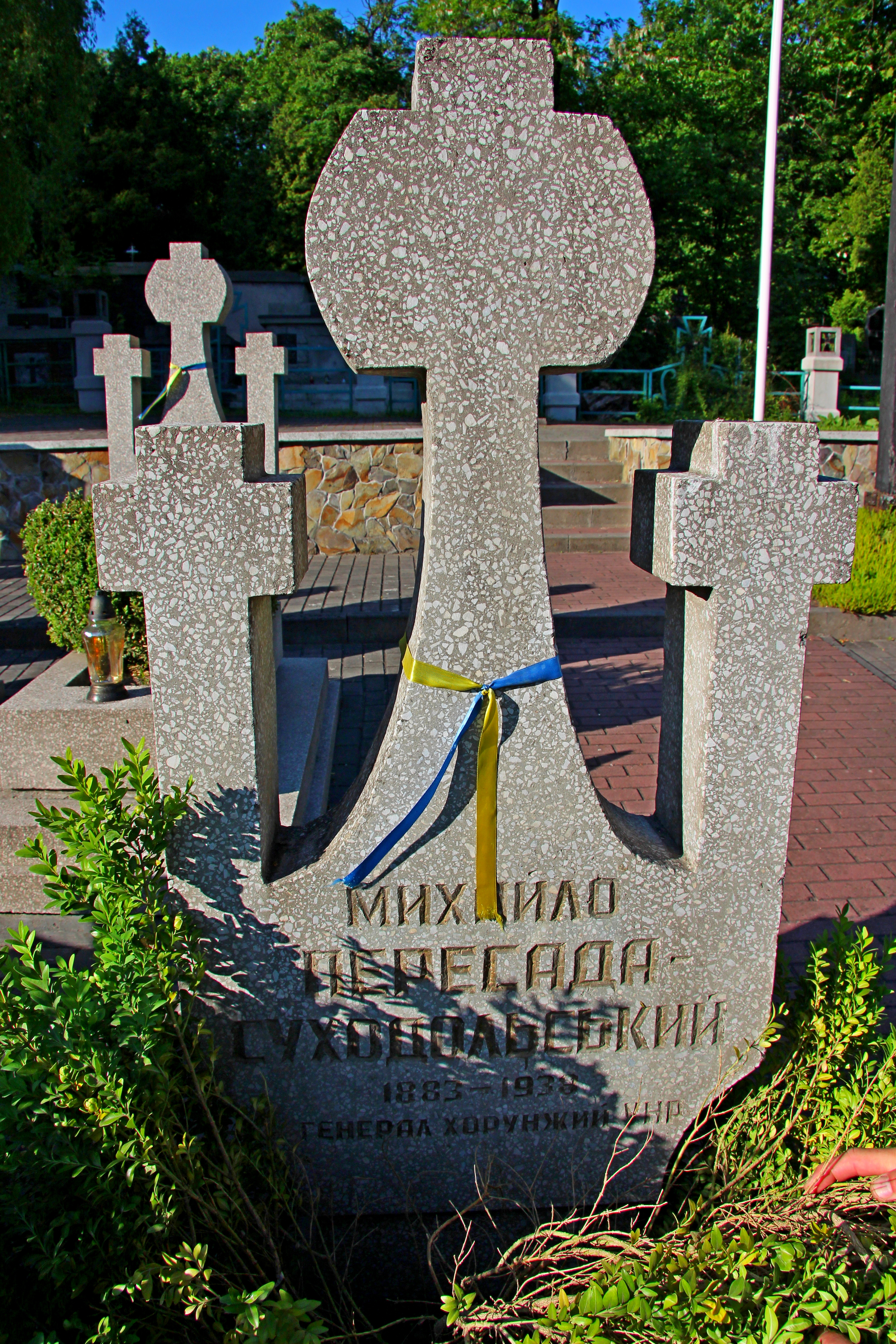 Янівський цвинтар.